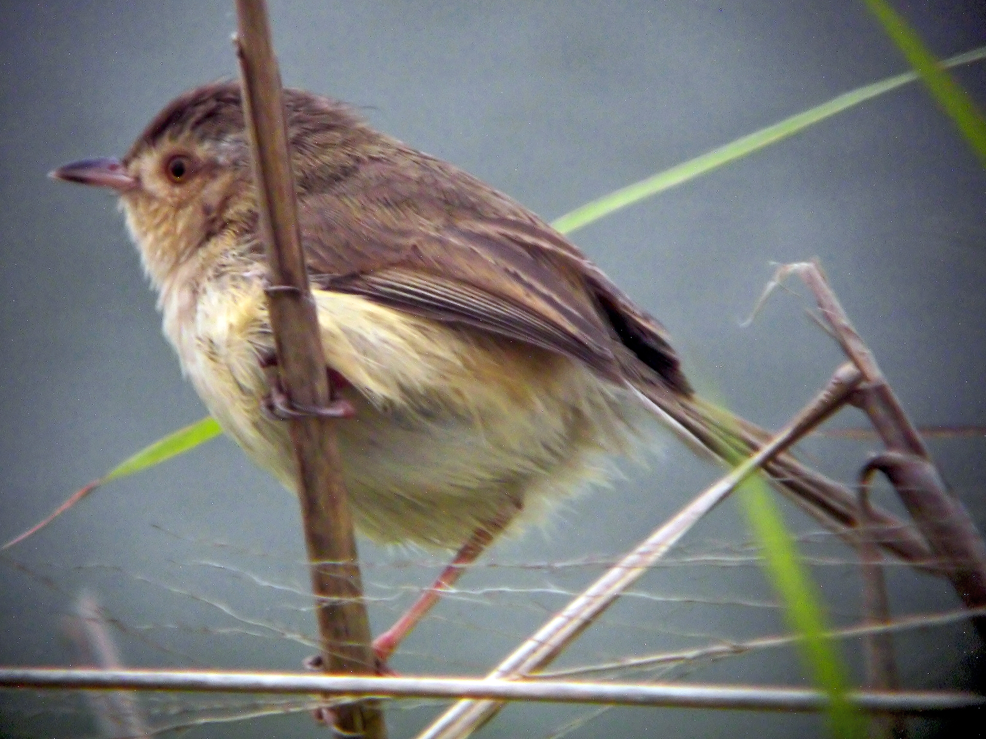 Plain Prinia (Prinia inornata)